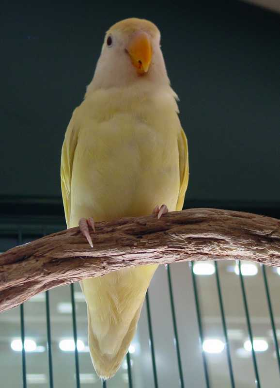 Agapornis Roseicolli Cremina